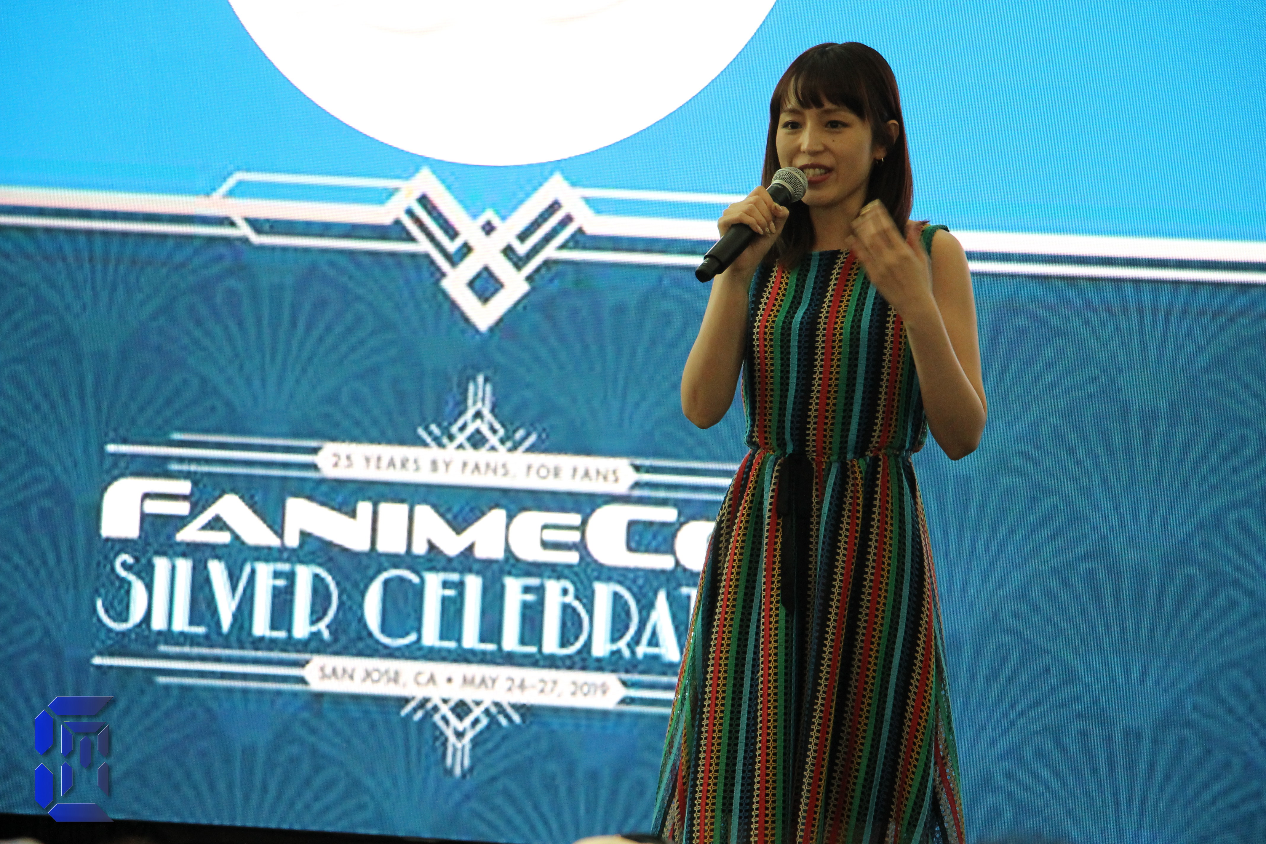 FanimeCon 2019 127